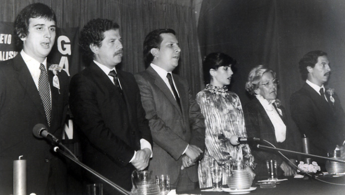 Iván Marulanda titula esta foto como "Con los fundadores del Nuevo Liberalismo", y la describe asi: "Estas dos fotos me parecen impresionantes. En ellas estamos Luis Carlos Galán, Rodrigo Lara, Gabriela White de Vélez, Nancy Restrepo de Lara, Hernán Vieira y yo. En una de ellas sólo aparecemos Luis Carlos, Rodrigo, Gabriela y yo. Ellos tres fueron sacrificados por la violencia. Los dos primeros, con quienes fundamos el Nuevo Liberalismo, fueron asesinados por la alianza entre la mafia y la política que destruyó las esperanzas de Colombia en la década de los ochentas, y Gabriela, quien encabezaba nuestra diputación en la Asamblea de Antioquia, fue secuestrada y asesinada por las FARC en 1991, cuando estaba reunida la Asamblea Nacional Constituyente, de la cual yo hacía parte. Gabriela es la madre de la actual Ministra de Educación, Cecilia María Vélez White." Foto probablemente tomada alrededor de 1979.